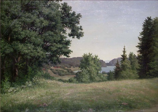 Landskapsstudie, Borrevannet.